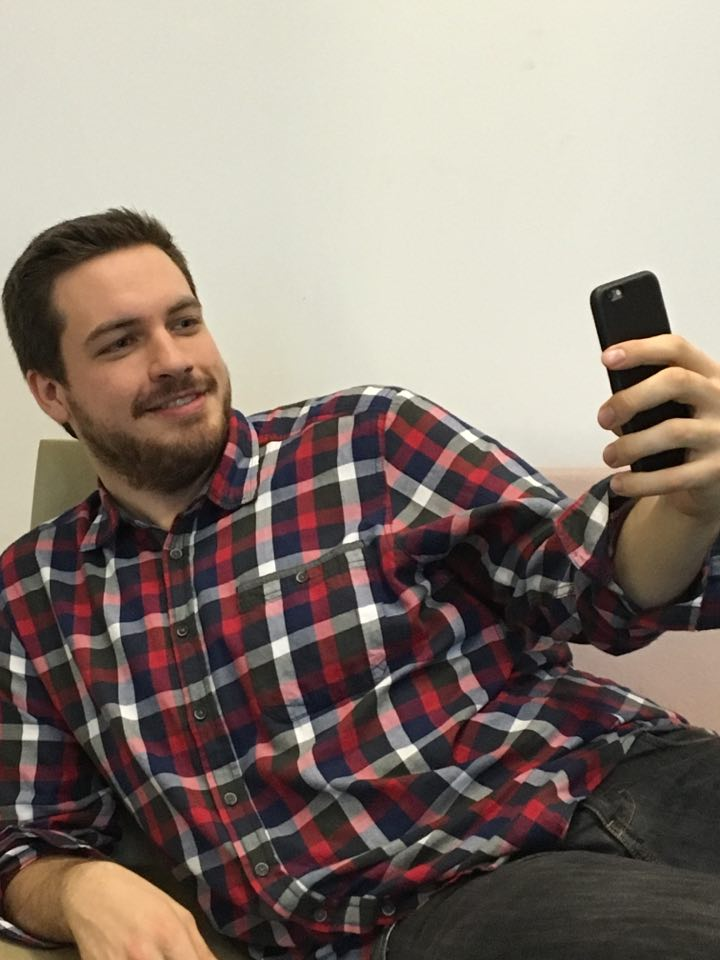 Lukas Lelie neemt een selfie